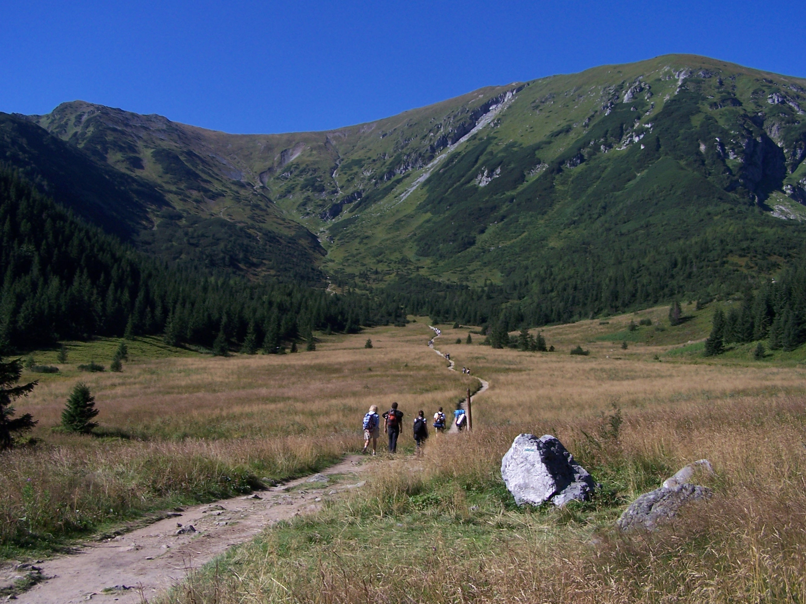 Dolina Kondratowa, Suchy Wierch Kondracki, Długi Żleb, Przełęcz pod Kopą Kondracką i Kopa Kondracka